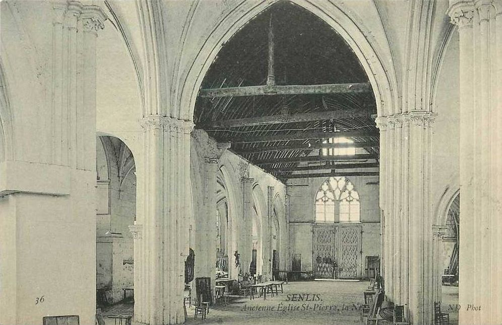 Après la fin du marché ; vue en direction du portail occidental. La charpente en carène de la nef est bien visible, tout comme les chapiteaux des colonnes engagées sans utilité.